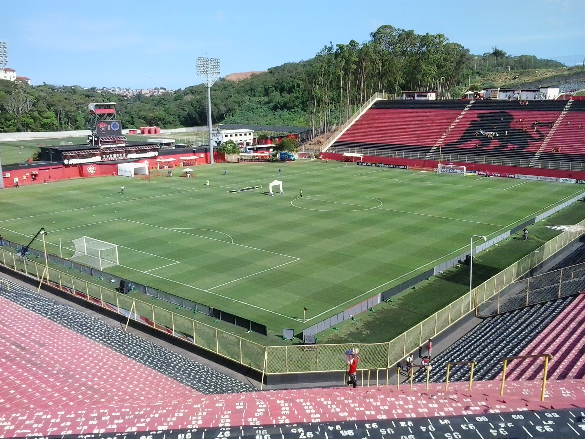 Estádio Barradão, pertence ao Esporte Clube Vitória. Capacidade: 30 mil torcedores.